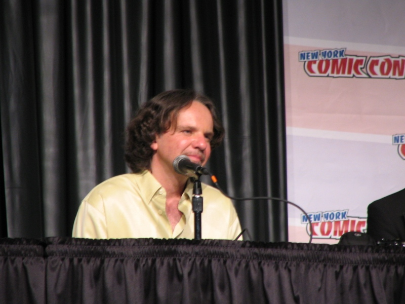 Frank Spontiz